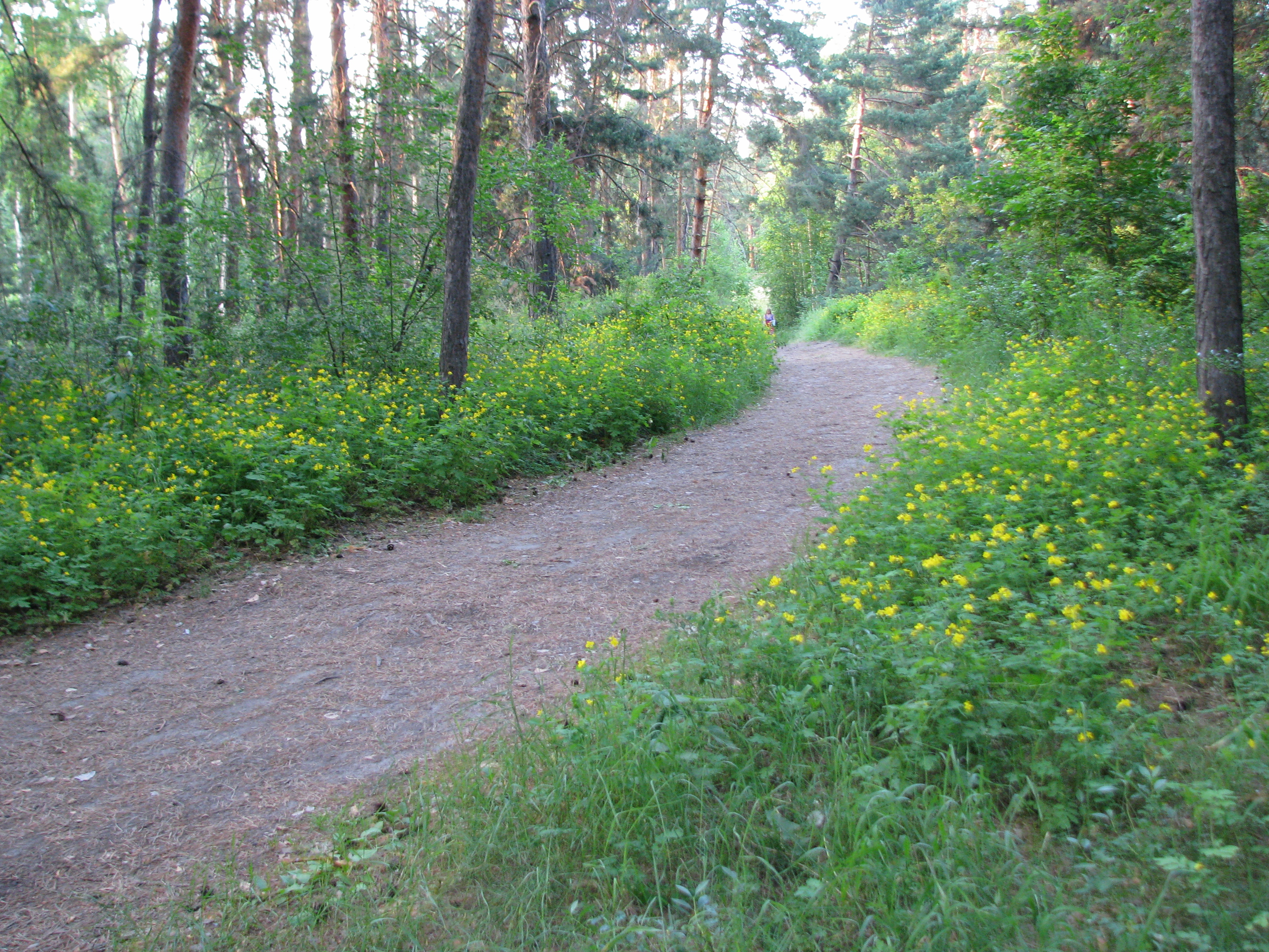 Сосновая роща: Звеpиноголовский район, Курганская область This image is related to the protected area of Russia number 4500017